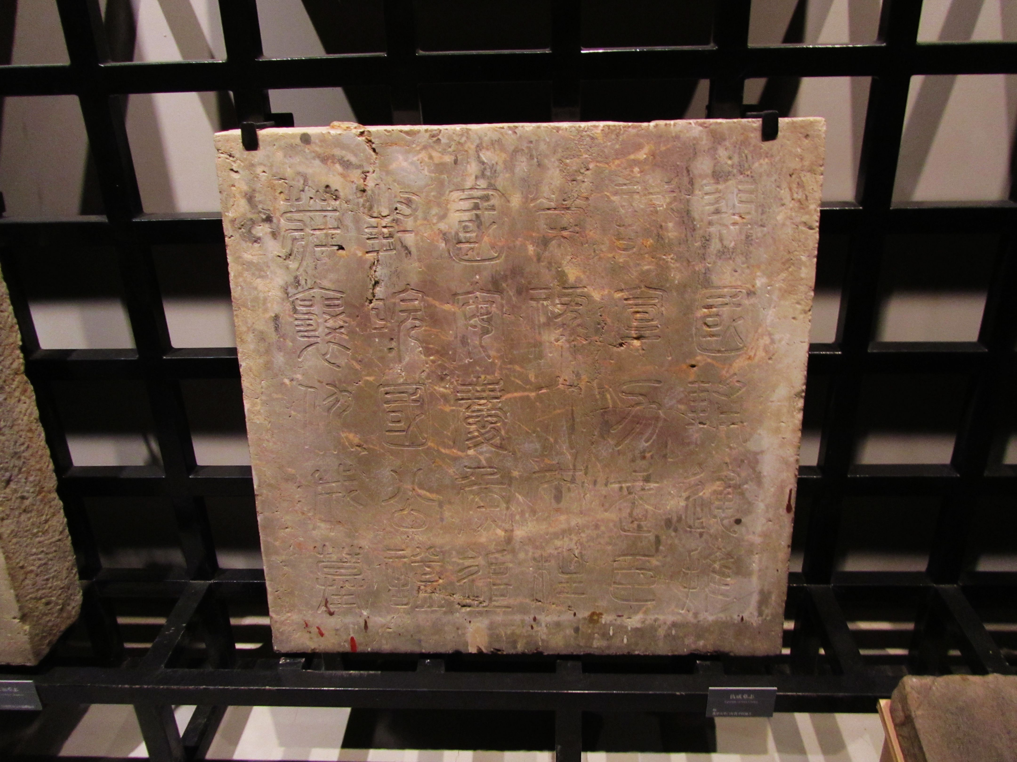 明代仇成墓志志盖，藏于南京市博物馆（朝天宫）。